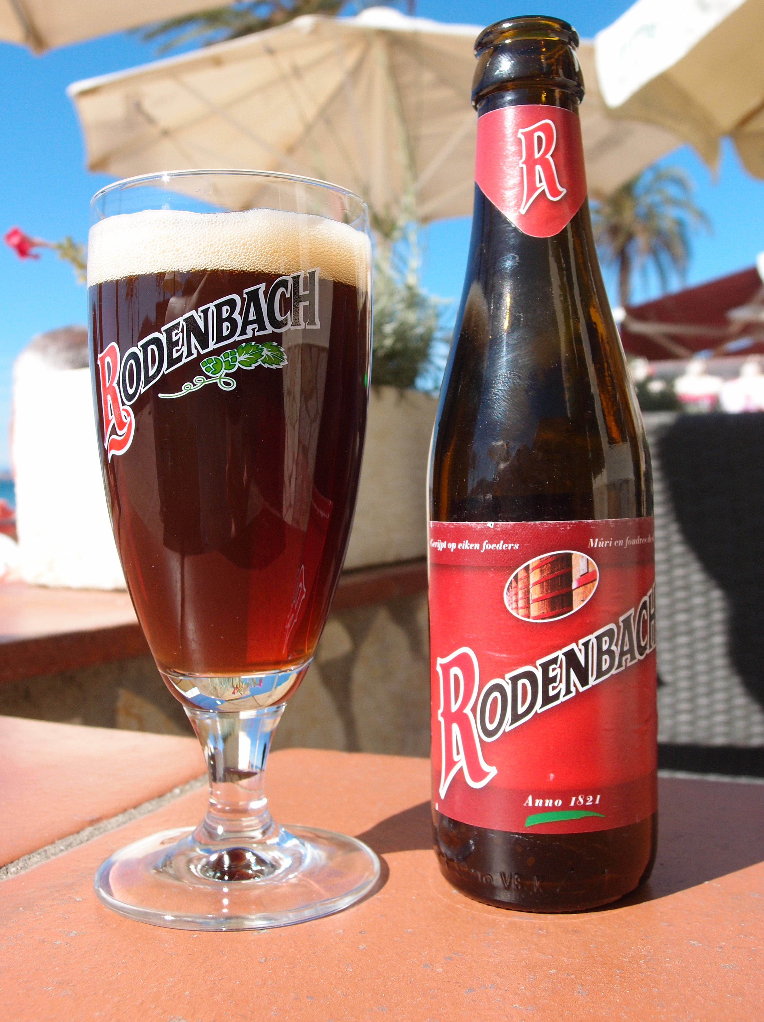 Rodenbach - belgisches Bier der Brauerei Palm Datum: 14.09.2012 Urheber: M. Pfeiffer alias Benutzer:Gordito1869 Quelle: privates Fotoarchiv des Urhebers